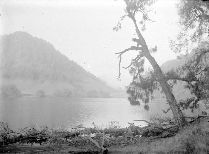 Negatief. Het meer Ranu Kumbala aan de voet van de vulkaan Semeru op 2410 meter hoogte